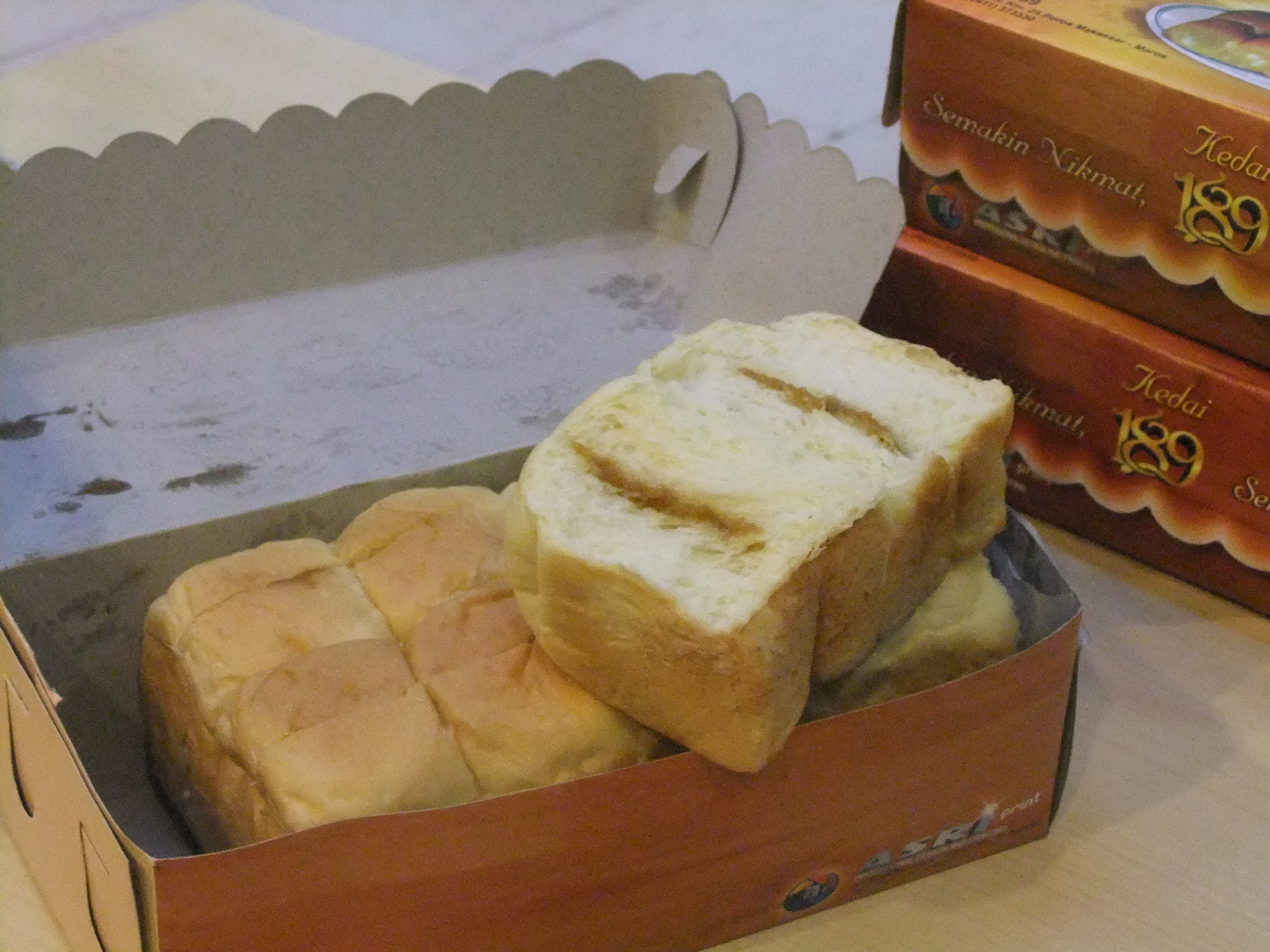 Roti Maros isi srikaya